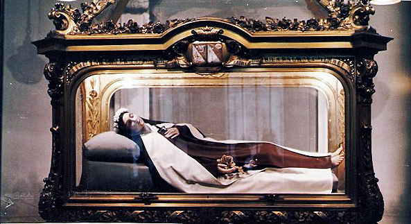 Tombeau de Ste.-Thérése